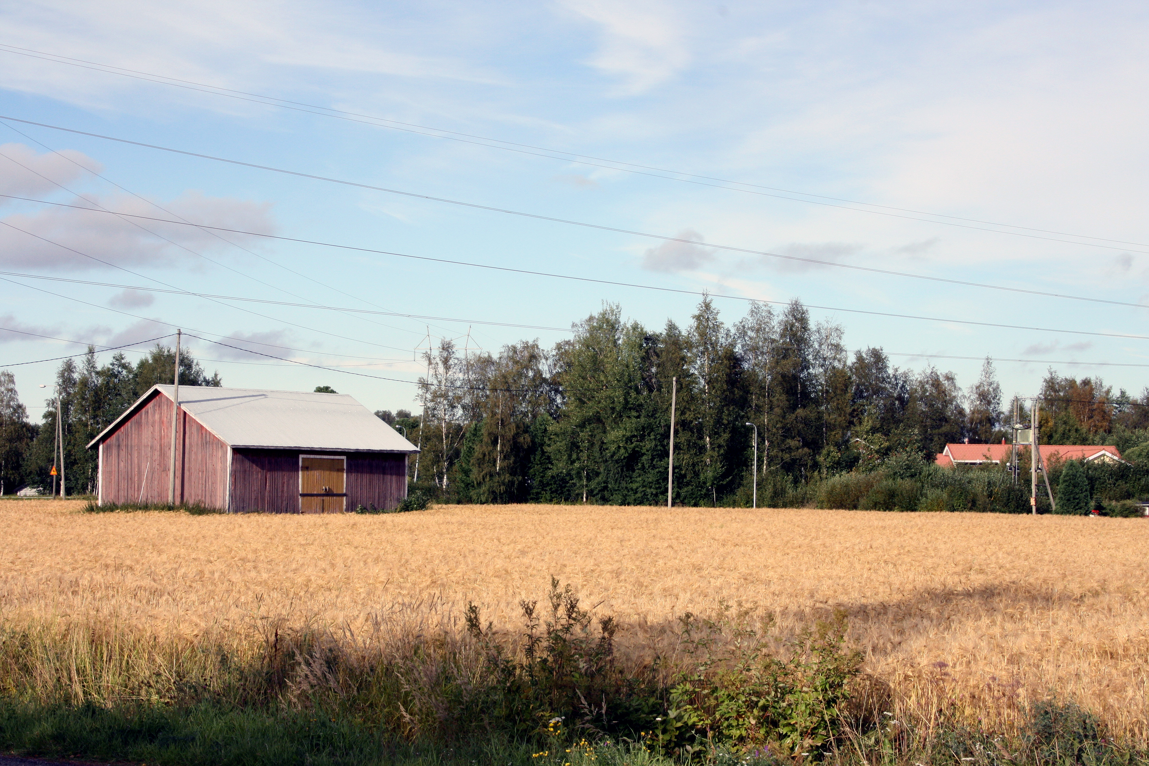 Kaustarin kaupunginosaa Kokkolassa, Suomessa.